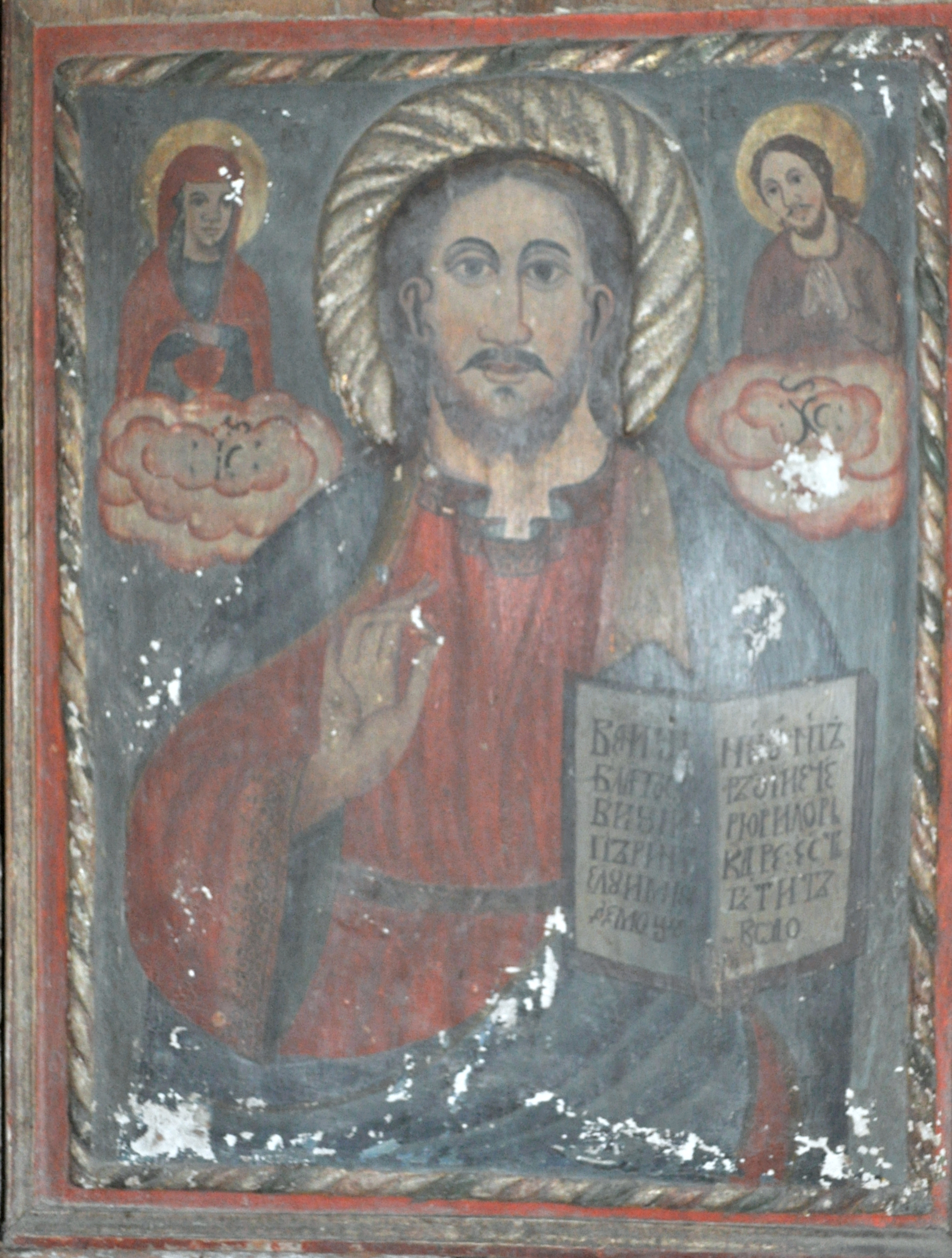 Biserica de lemn din Gârbău Dejului